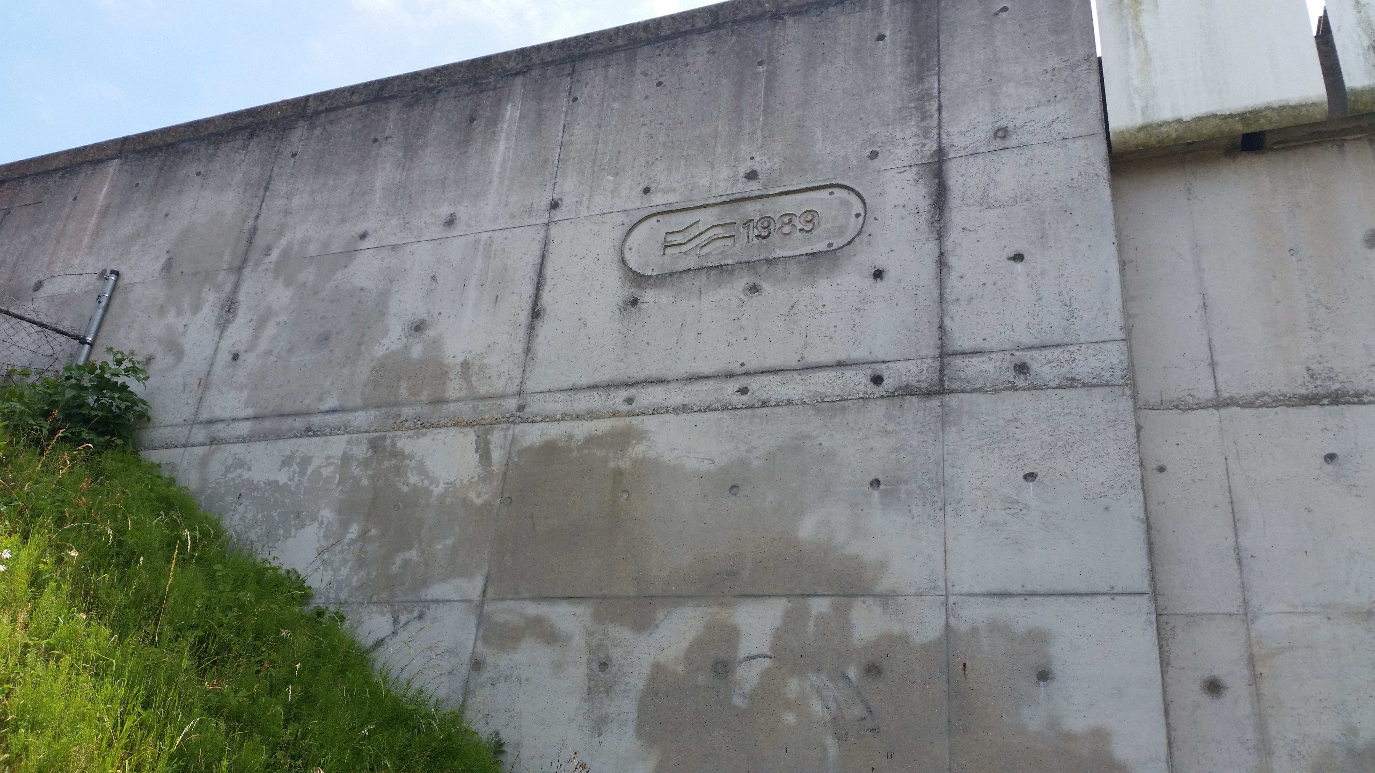 Brug 1640, spoorbrug metro over Joan Muyskenweg, Amsterdam-Duivendrecht